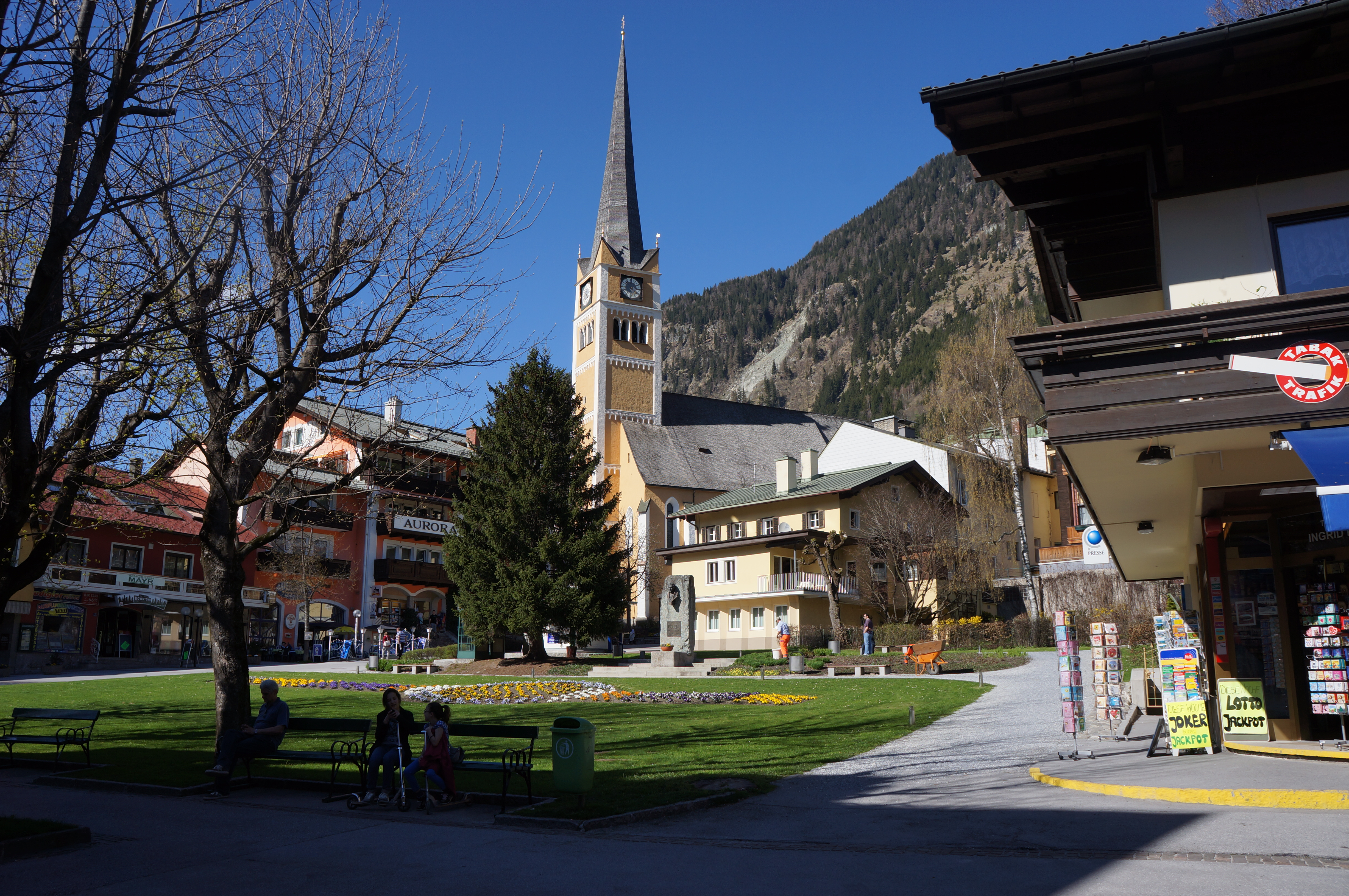 Bad Hofgastein centrum města